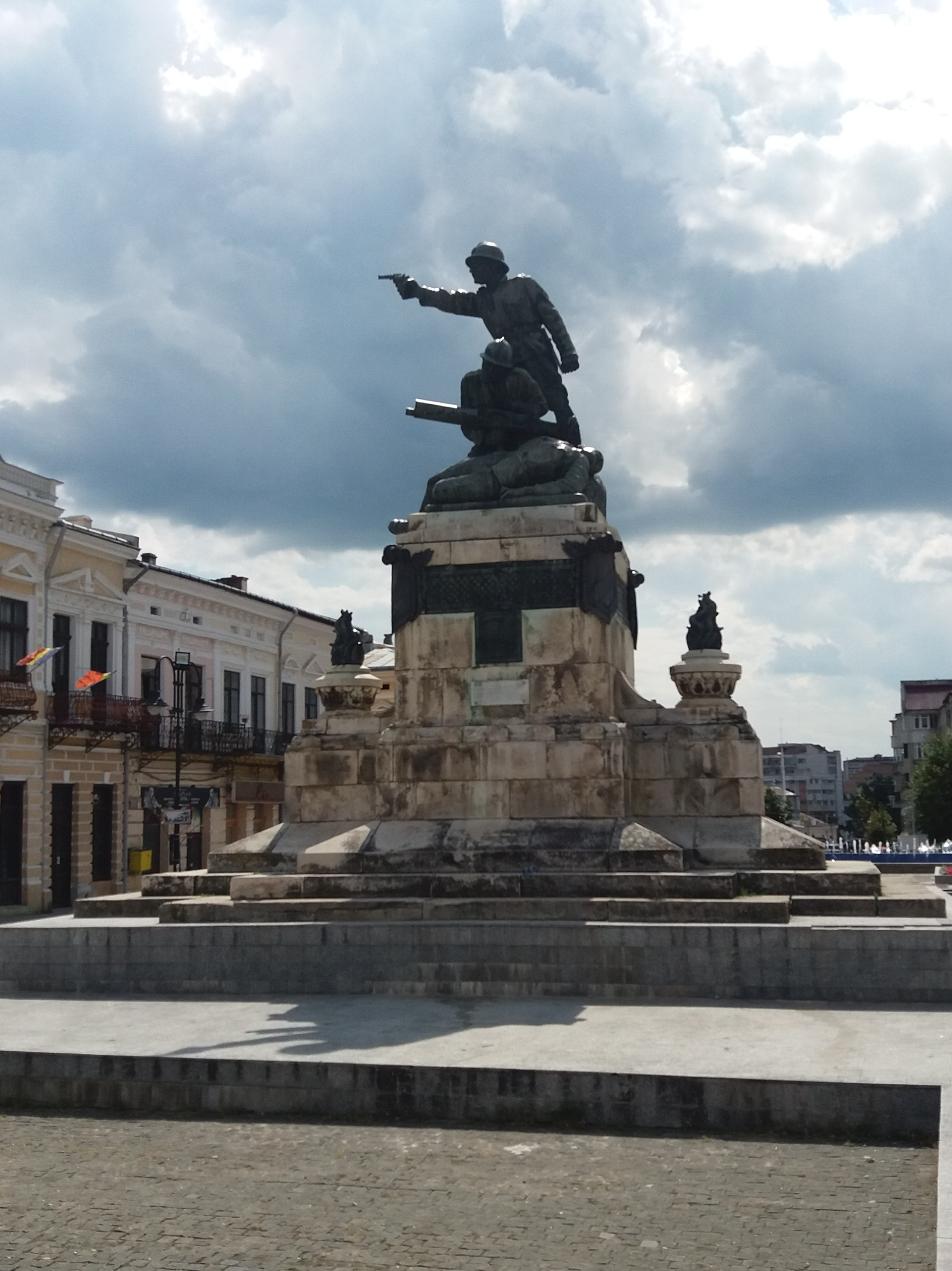 Grupul statuar „Compania de mitraliere Maior Ignat în Atac”